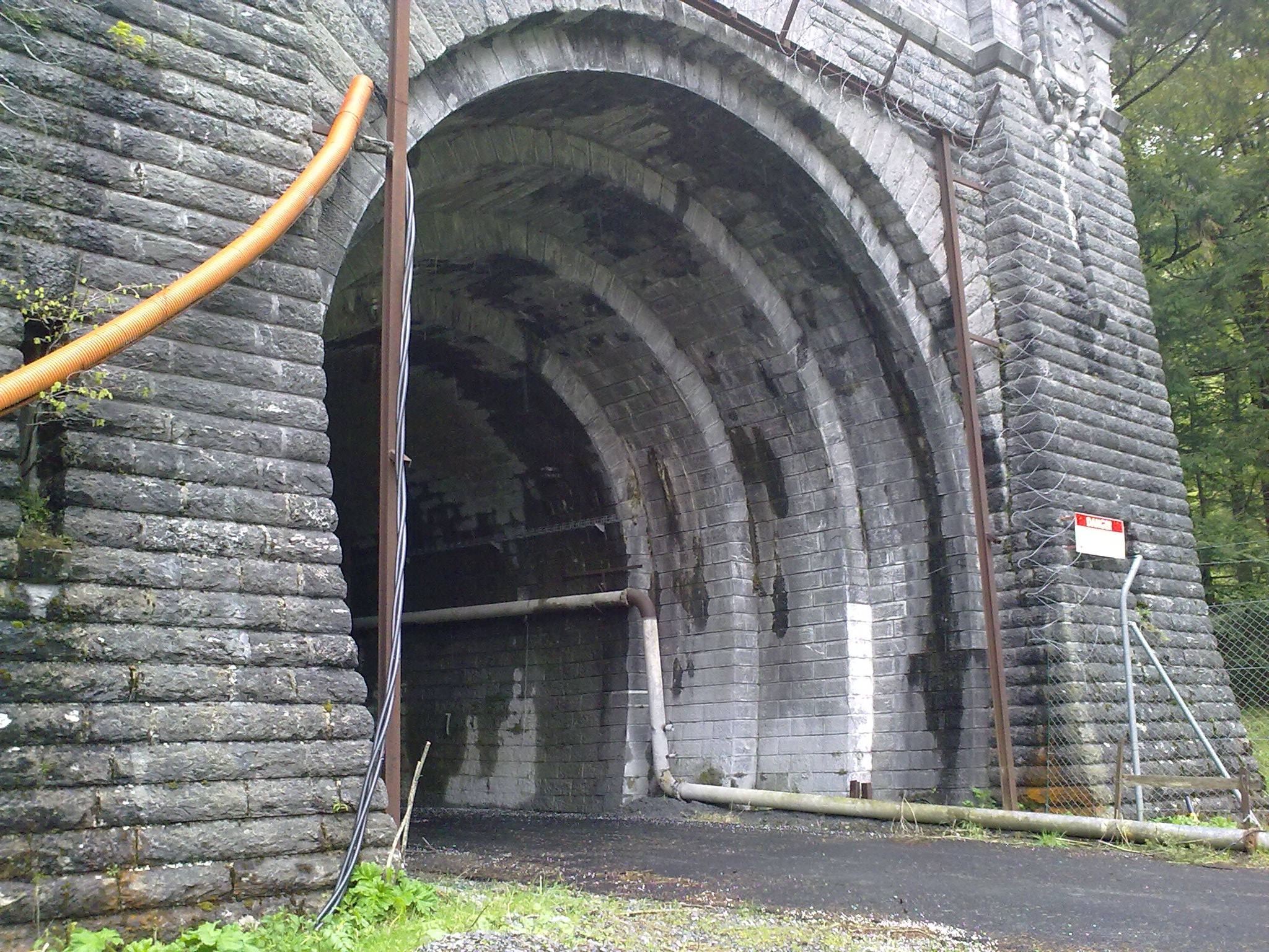 Tunnel ferroviaire du Somport, côté français le 16 mai 2010.